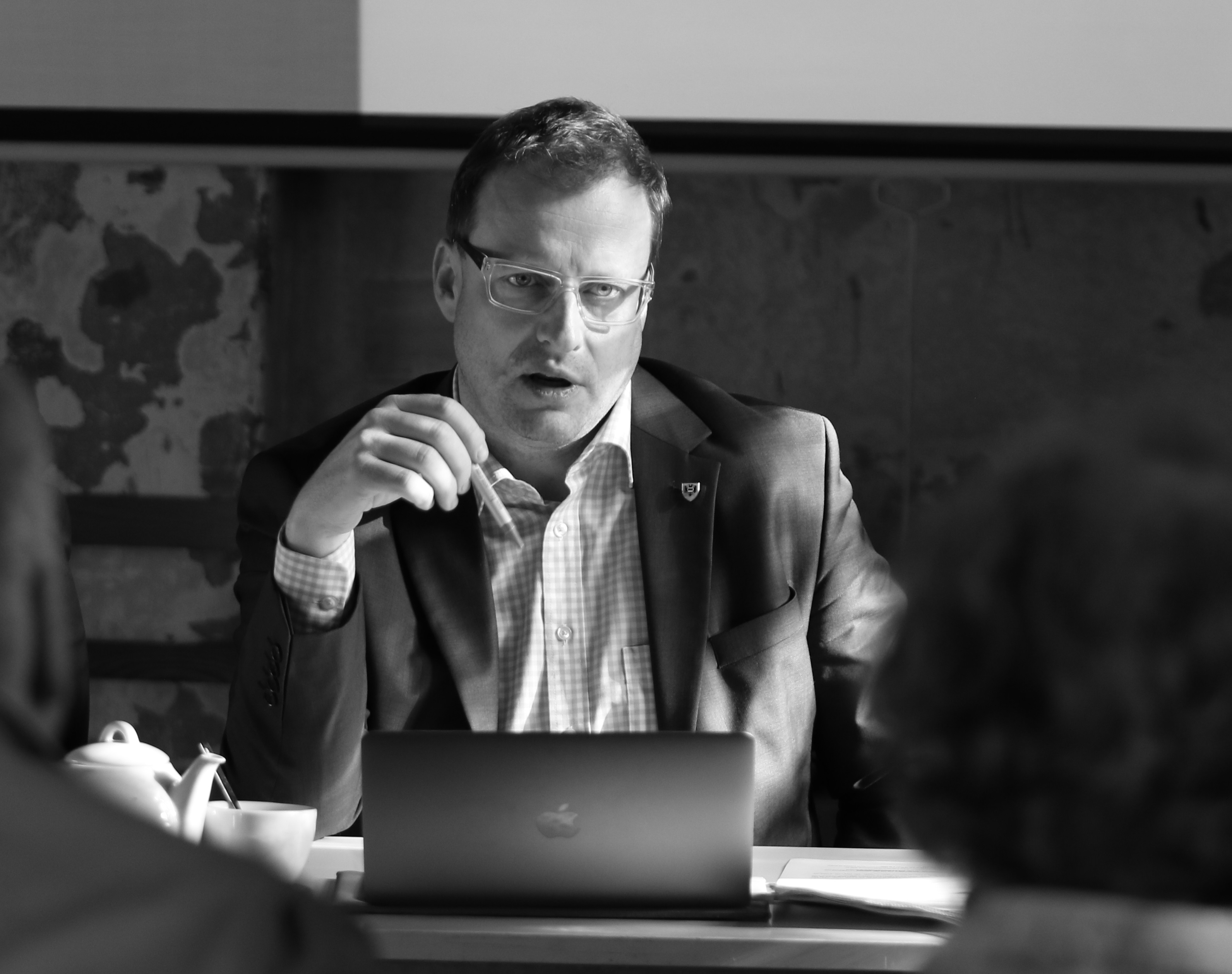 Svatopluk Bartík na tiskové konferenci (8. 11. 2016)